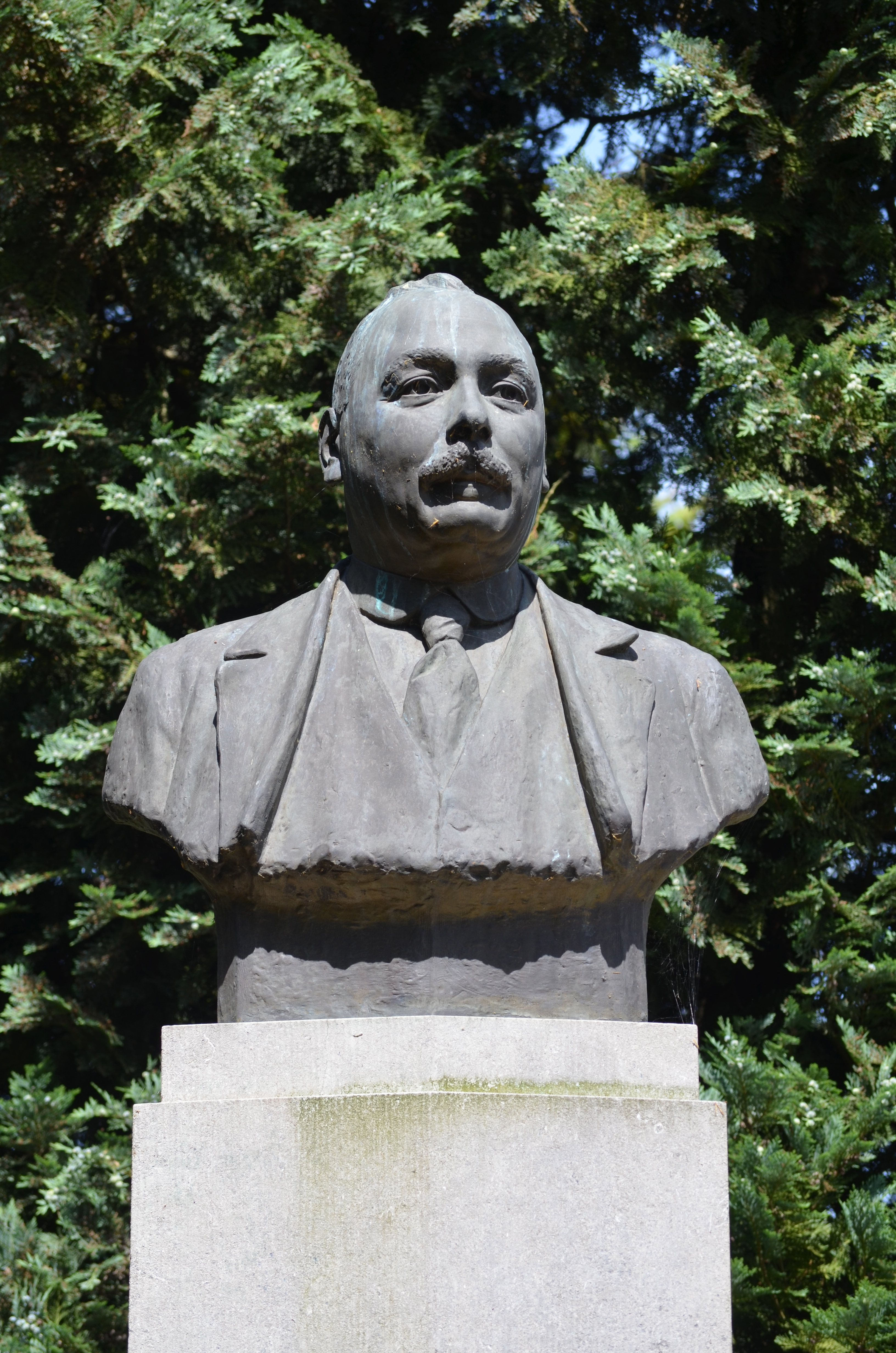 Marchienne-au-Pont (Charleroi-Belgique) - Buste de Robert Fesler réalisé en 1932 par Jules Vanderstock (1897-1944).